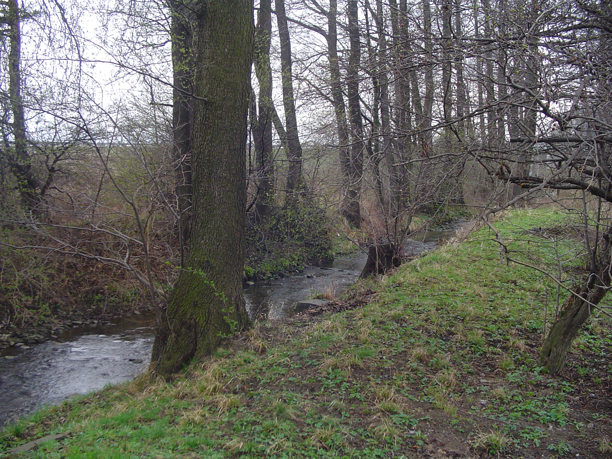 Rybny Potok przepływający obok os. Zgoda w Żywcu, obok Browaru Żywiec, 500 m przed ujściem do Soły